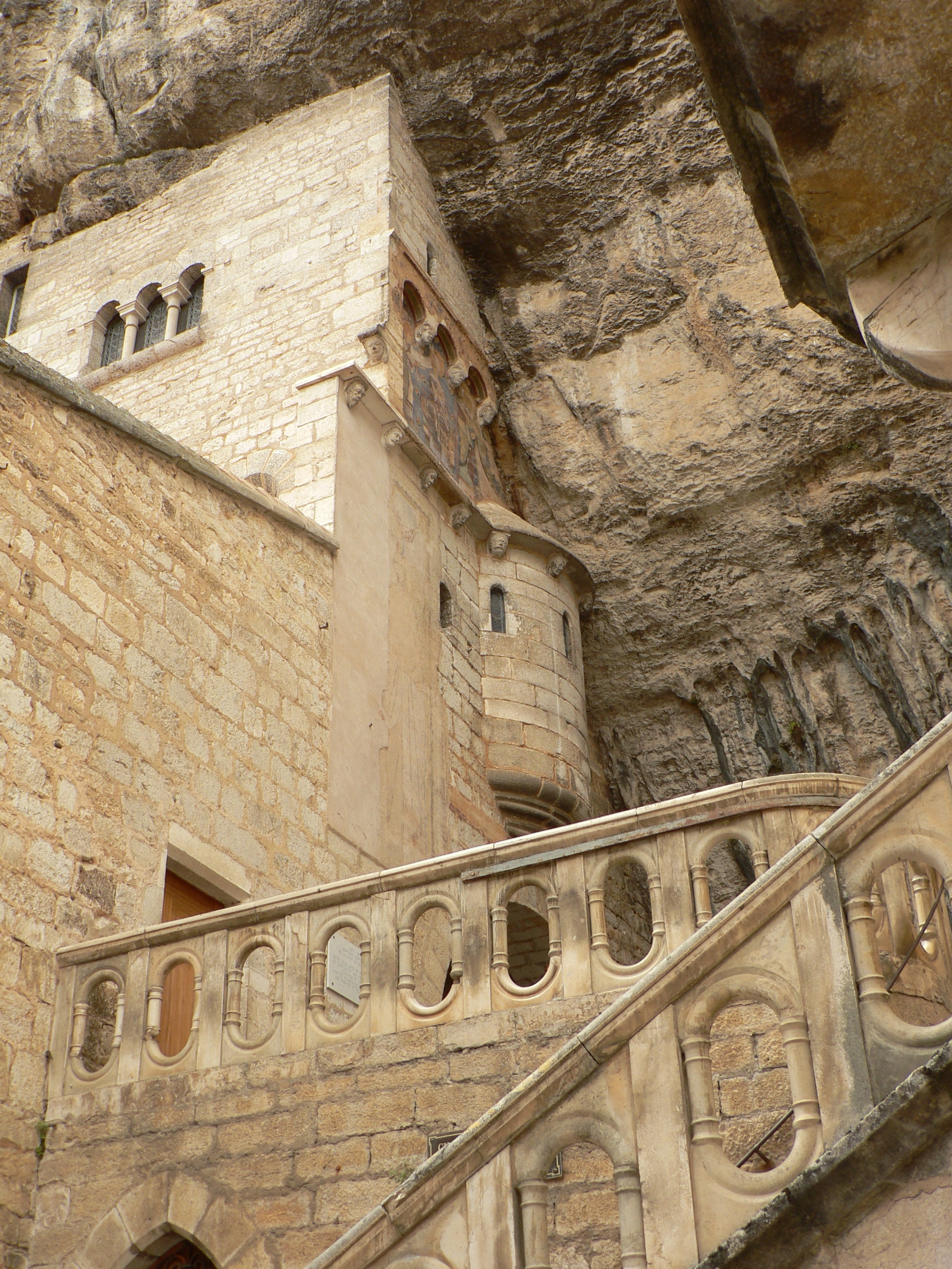 Rocamadour (France), le sanctuaire, détail